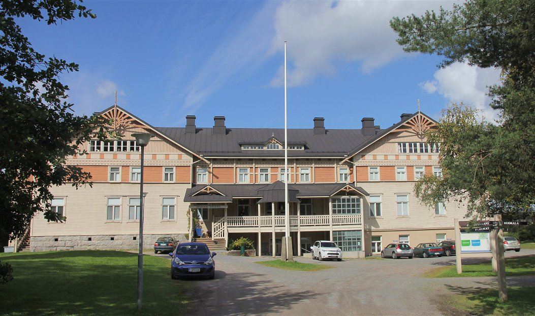 Otavan opiston päärakennus Mikkelin Otavan taajamassa.